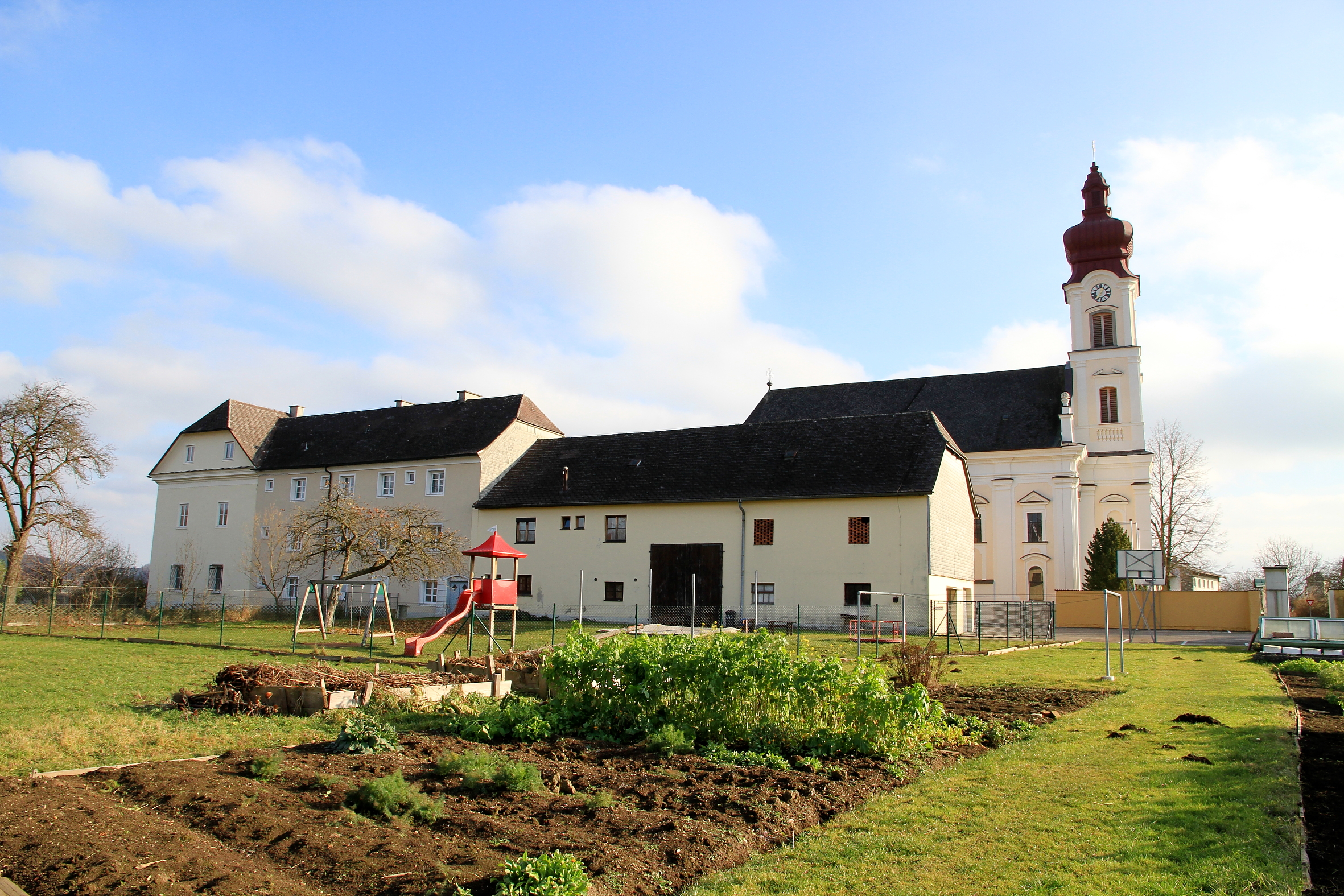 Das ehemalige Kloster in Oberthalheim, ein Ortsteil in der oberösterreichischen Marktgemeinde Timelkam.